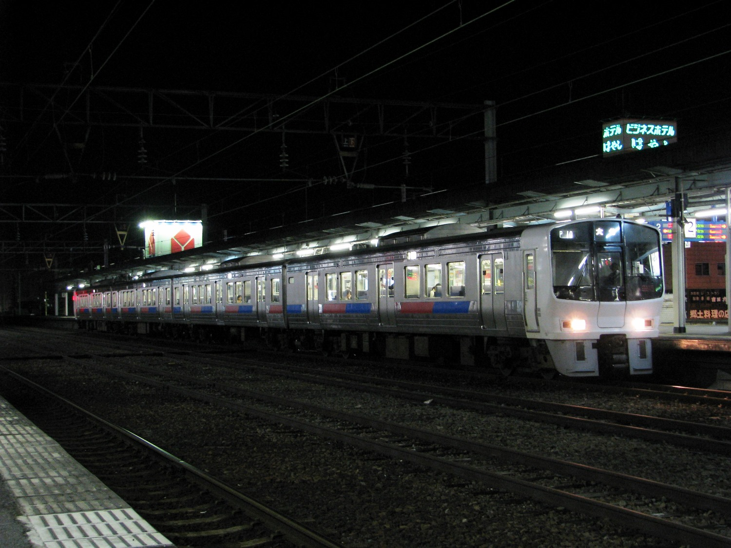 大分地区で運用される811系